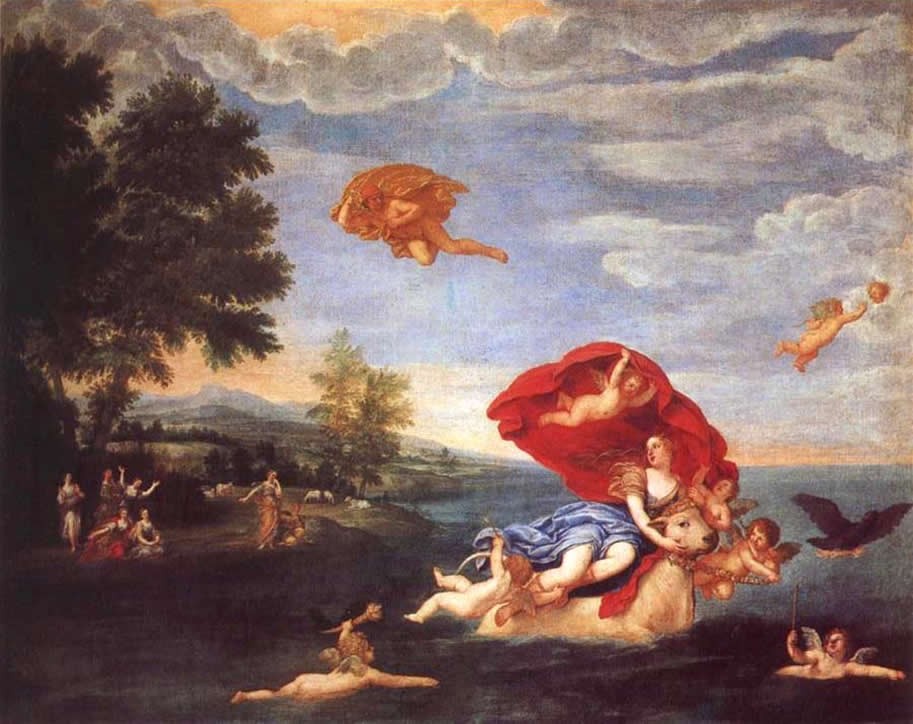 Rape of Europalabel QS:Lit,"Il ratto d’Europa" label QS:Lfr,"Le rapt d'Europe" label QS:Len,"Rape of Europa" label QS:Lpl,"Porwanie Europy"